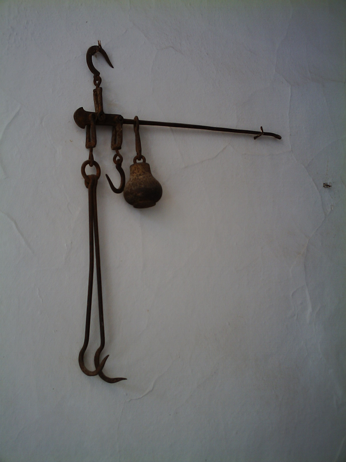 Una romana (balança tradicional de Mallorca) Autor: P. Pérez Juliol 2006